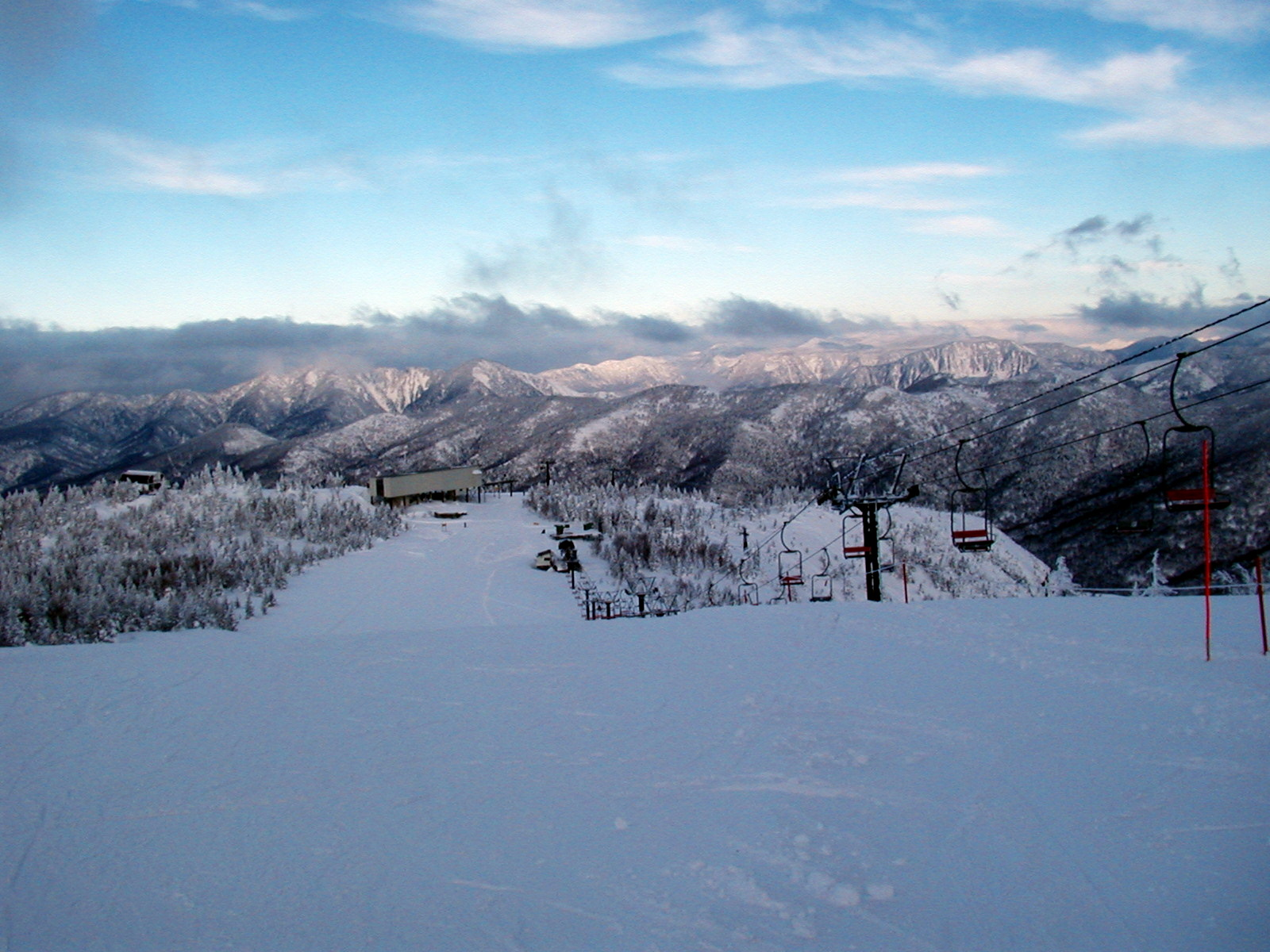 奥志賀高原スキー場の風景。焼額山の頂上付近から北西を望む。